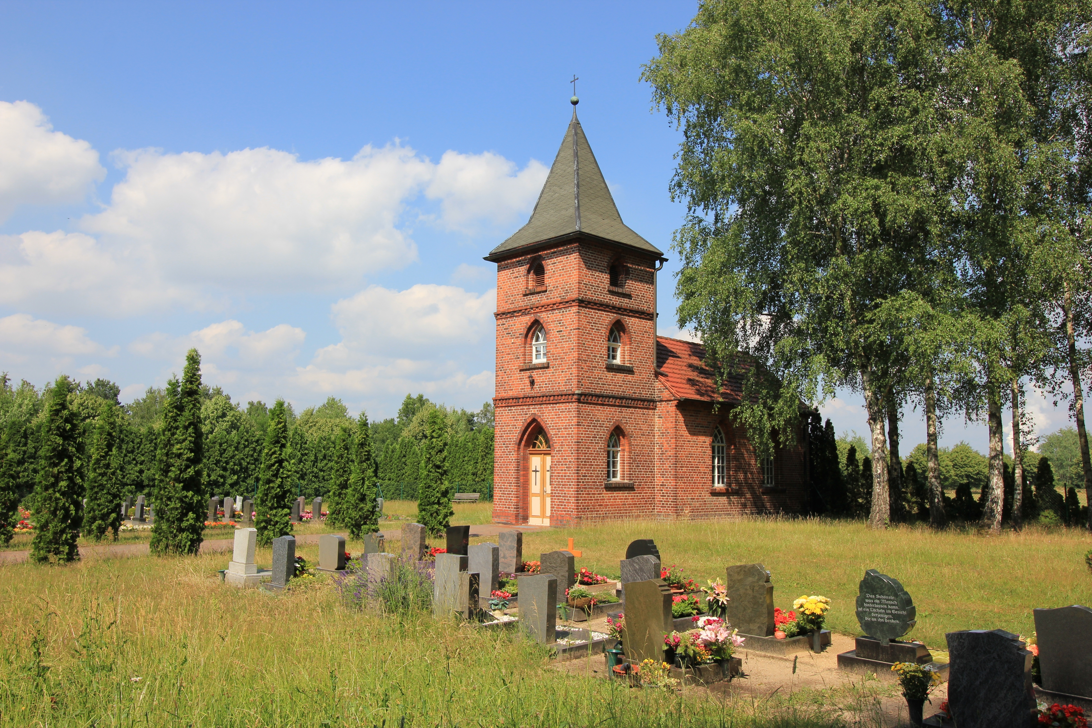 Hornjoserbsce: Kěrchow w Zabrodźe.